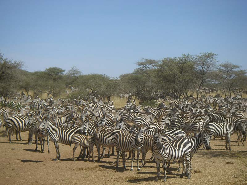 Zebraer i Serengeti